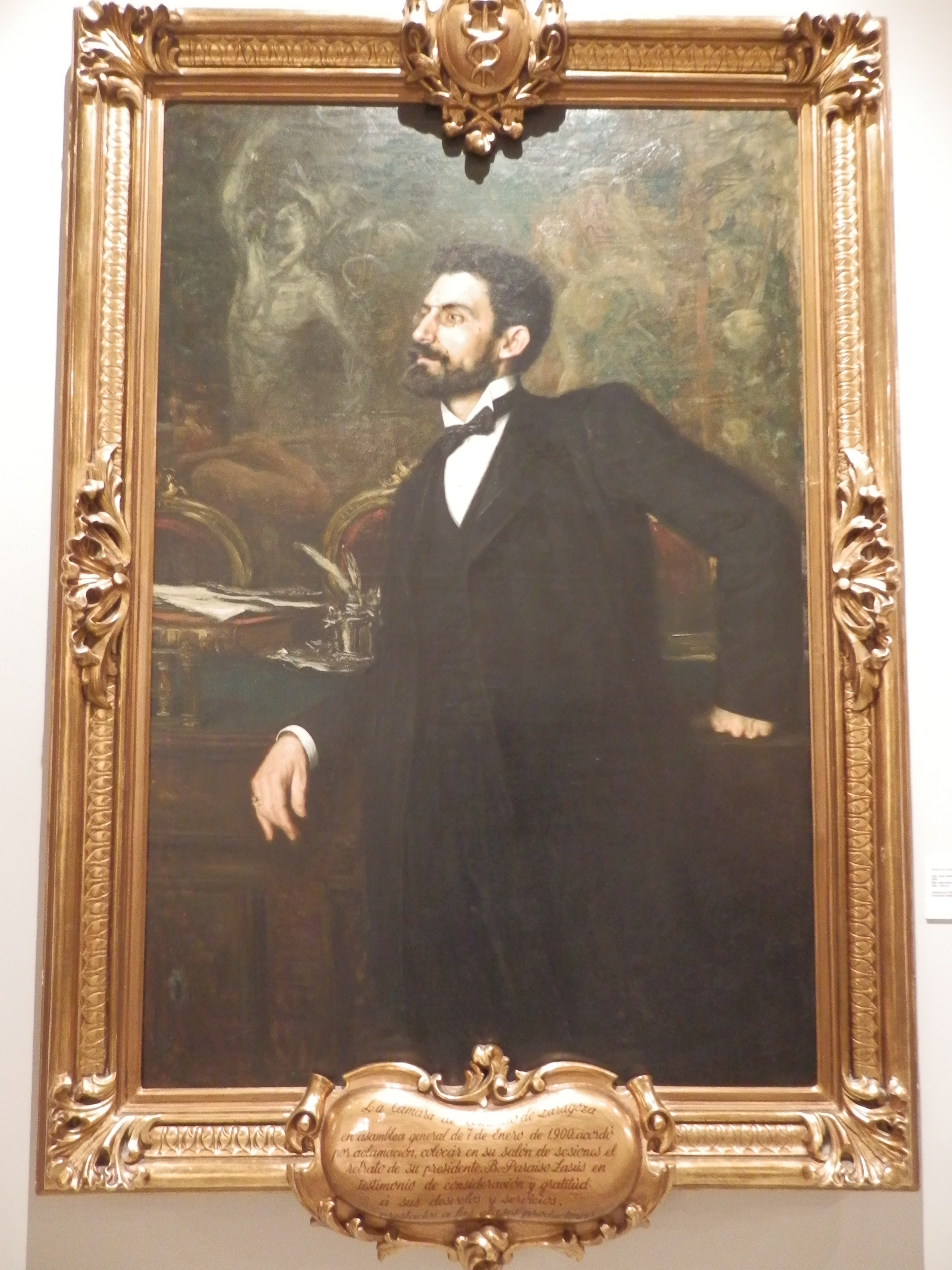 Cuadro dedicado a Basilio Paraíso pintado en enero de 1900. Expuesto en el Paraninfo de la Universidad de Zaragoza.